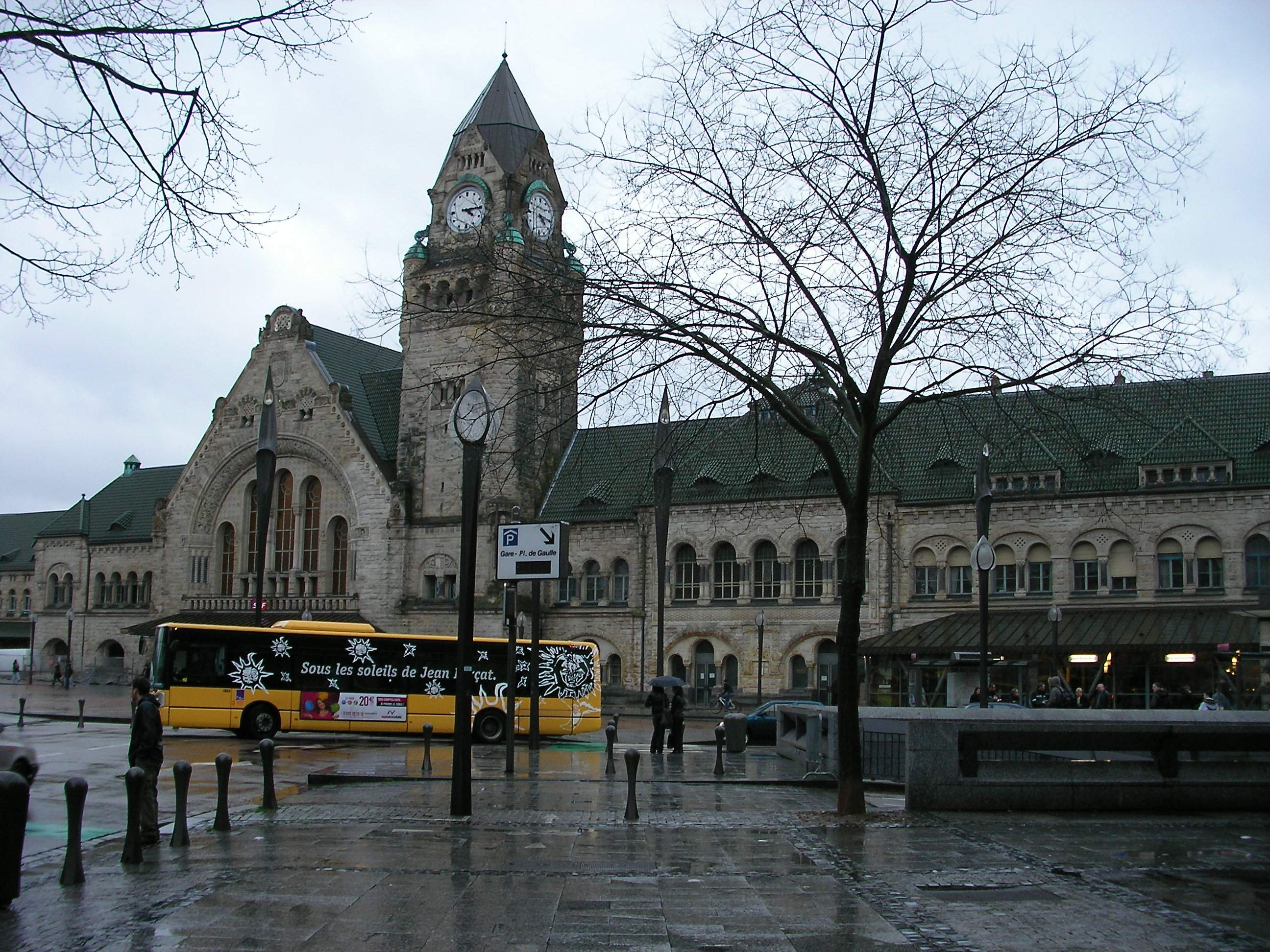 Gare de Metz (Moselle, France).